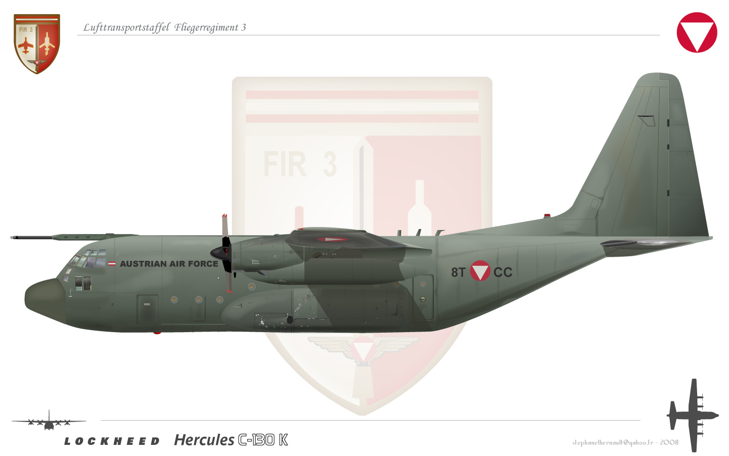 C 130K Austrian Air Force